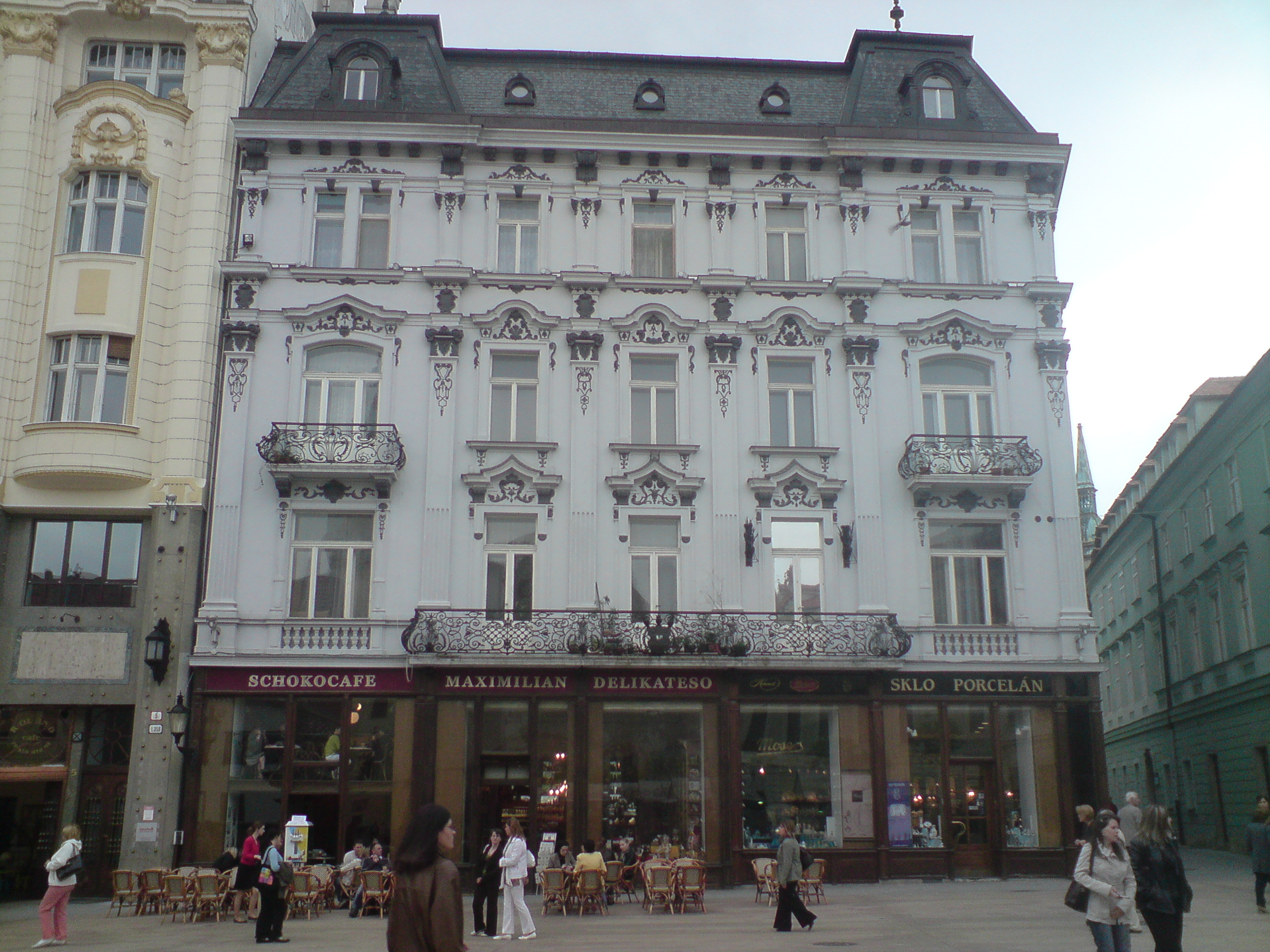 Paluďaiov palác, Hlavné námestie, Bratislava